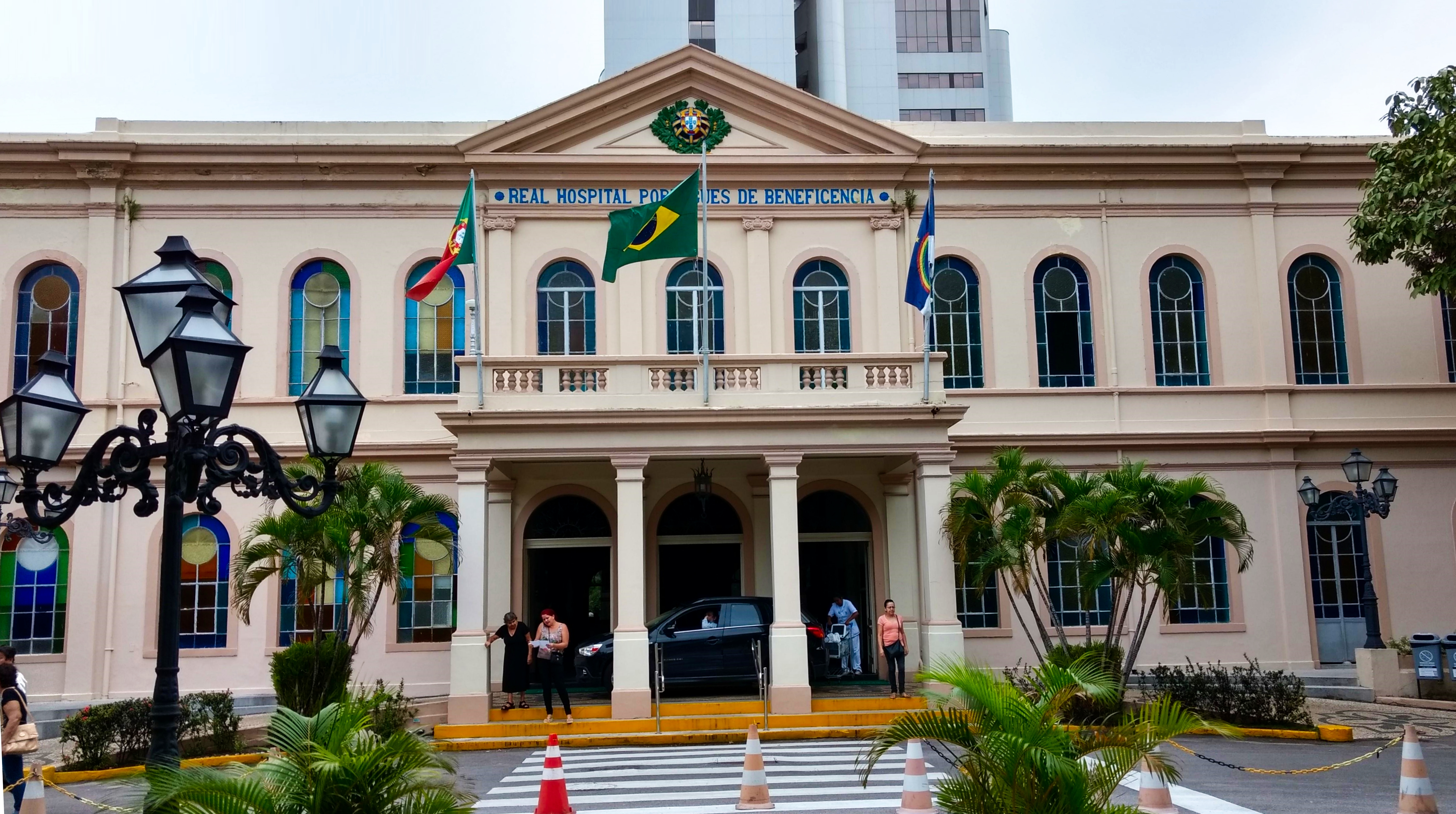 Fachada do edifício principal do Hospital Português, no Recife.